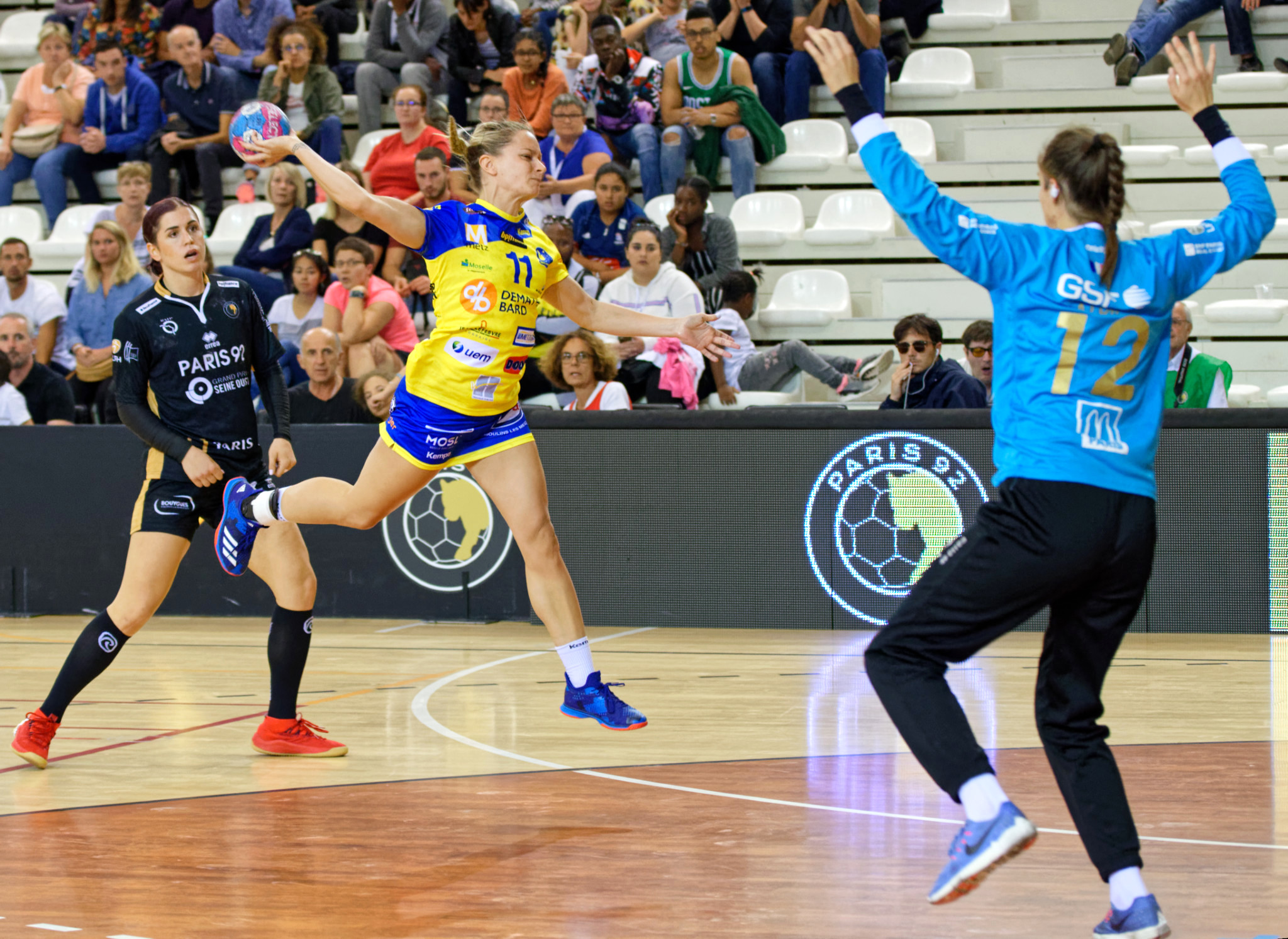 Rencontre de la 5e journée de la LFH entre Paris 92 et Metz Handball. A Issy-Les-Moulineaux, le 16 septembre 2018.